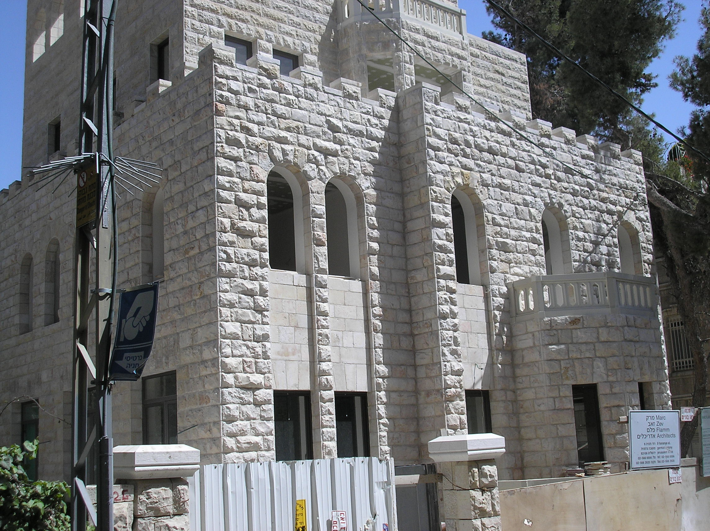 Beit Mughannam, Talbiya, Jerusalem